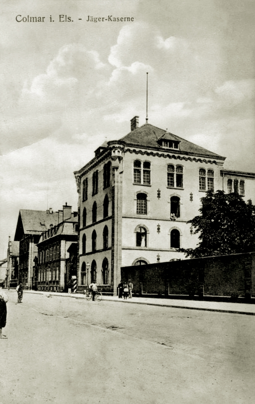 Jägerkaserne in Colmar im Elsass um 1910.